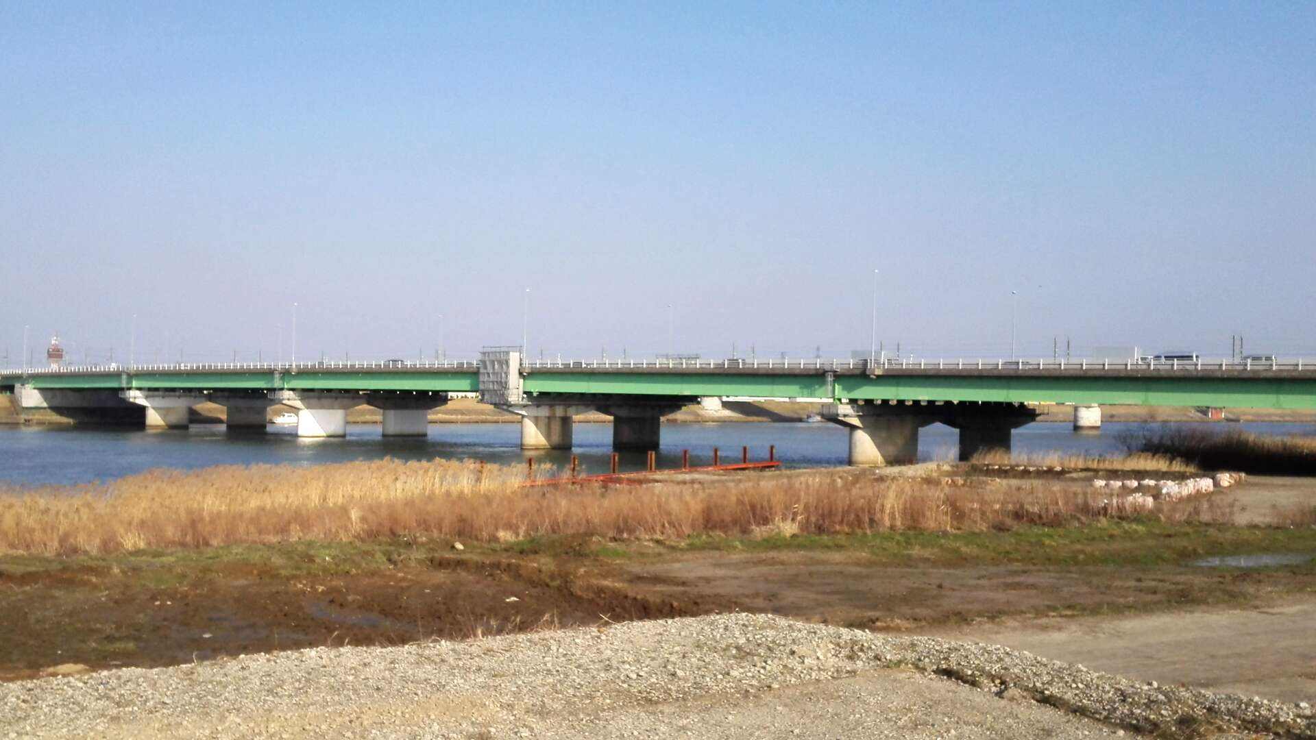 下流側から撮影